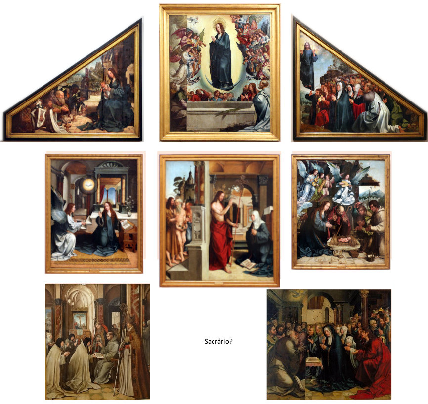 Rekonstrukcja poliptyku Matki Bożej